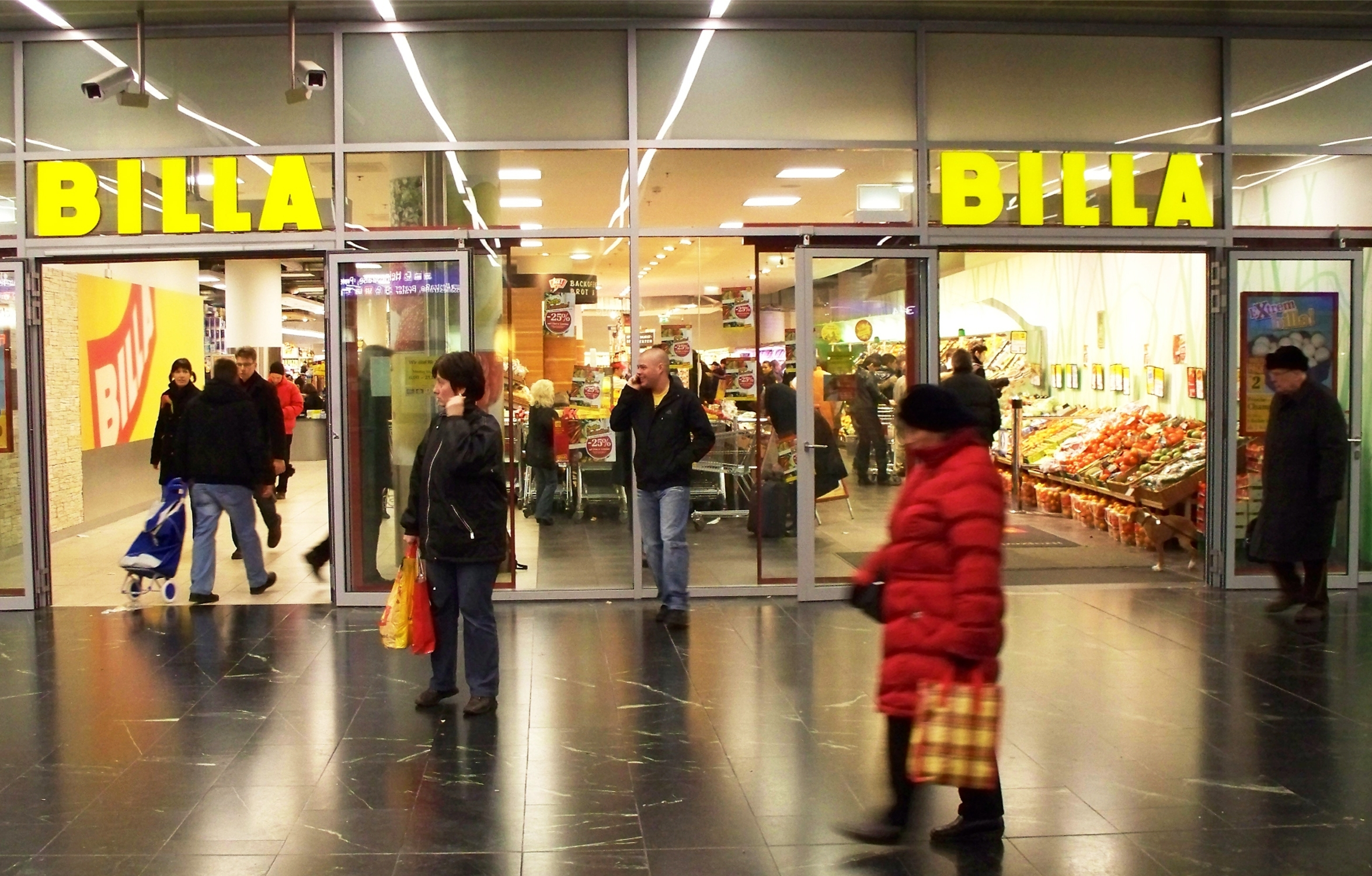 Ein Billa-Supermarkt im Bahnhof Wien Praterstern.